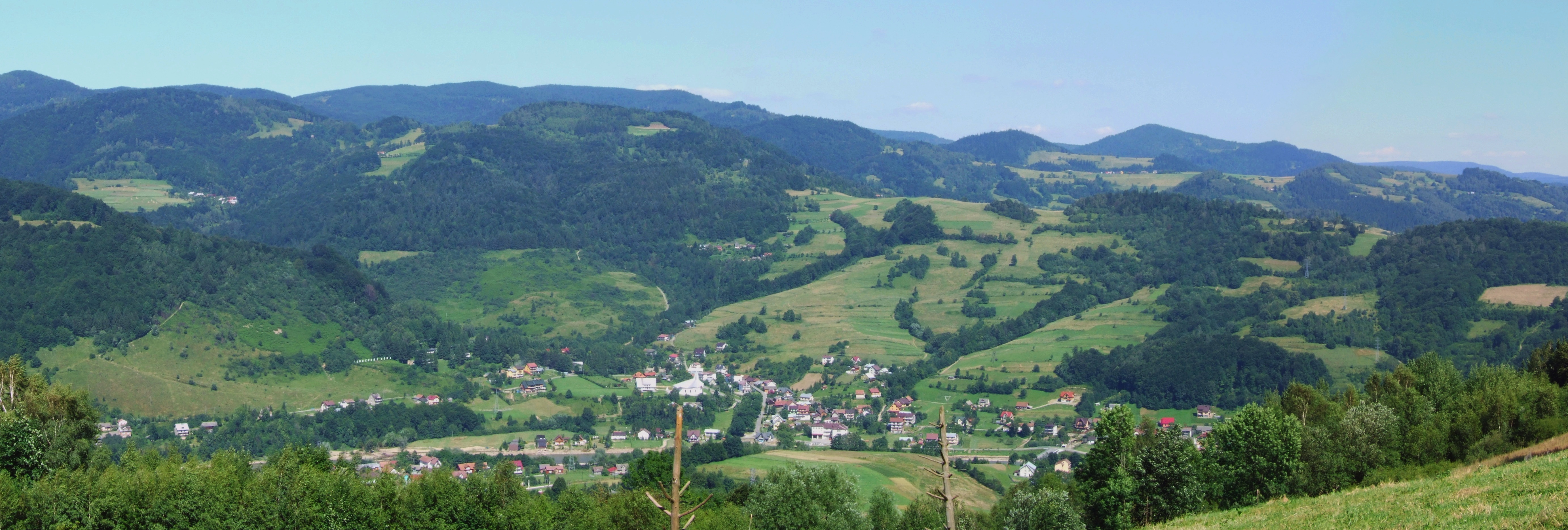 Miejscowość Głębokie na tle gór Pasma Jaworzyny.